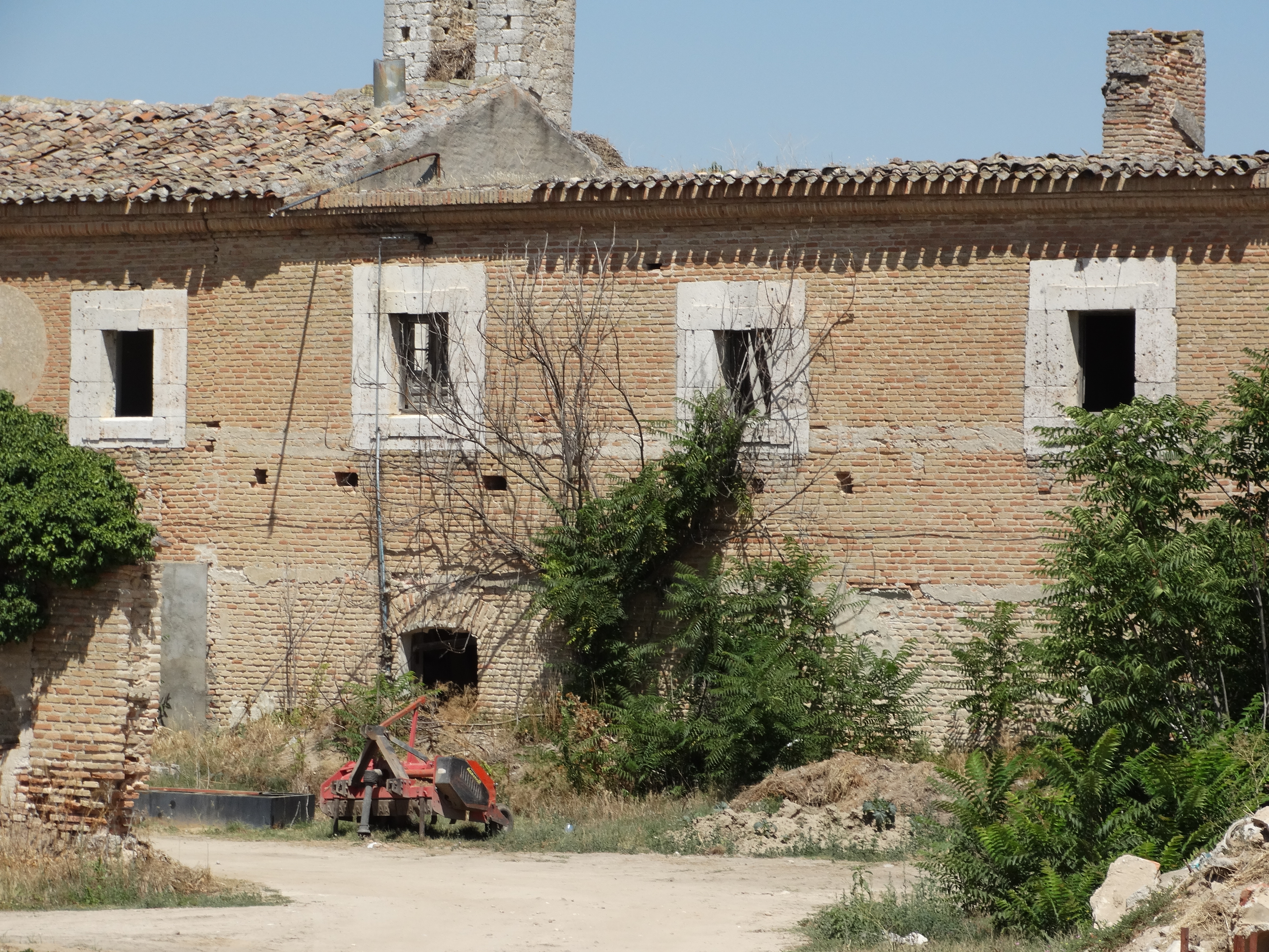 Ruinas del despoblado de Aniago en Valladolid, España. Celdas de los monjes del monasterio por la parte exterior.